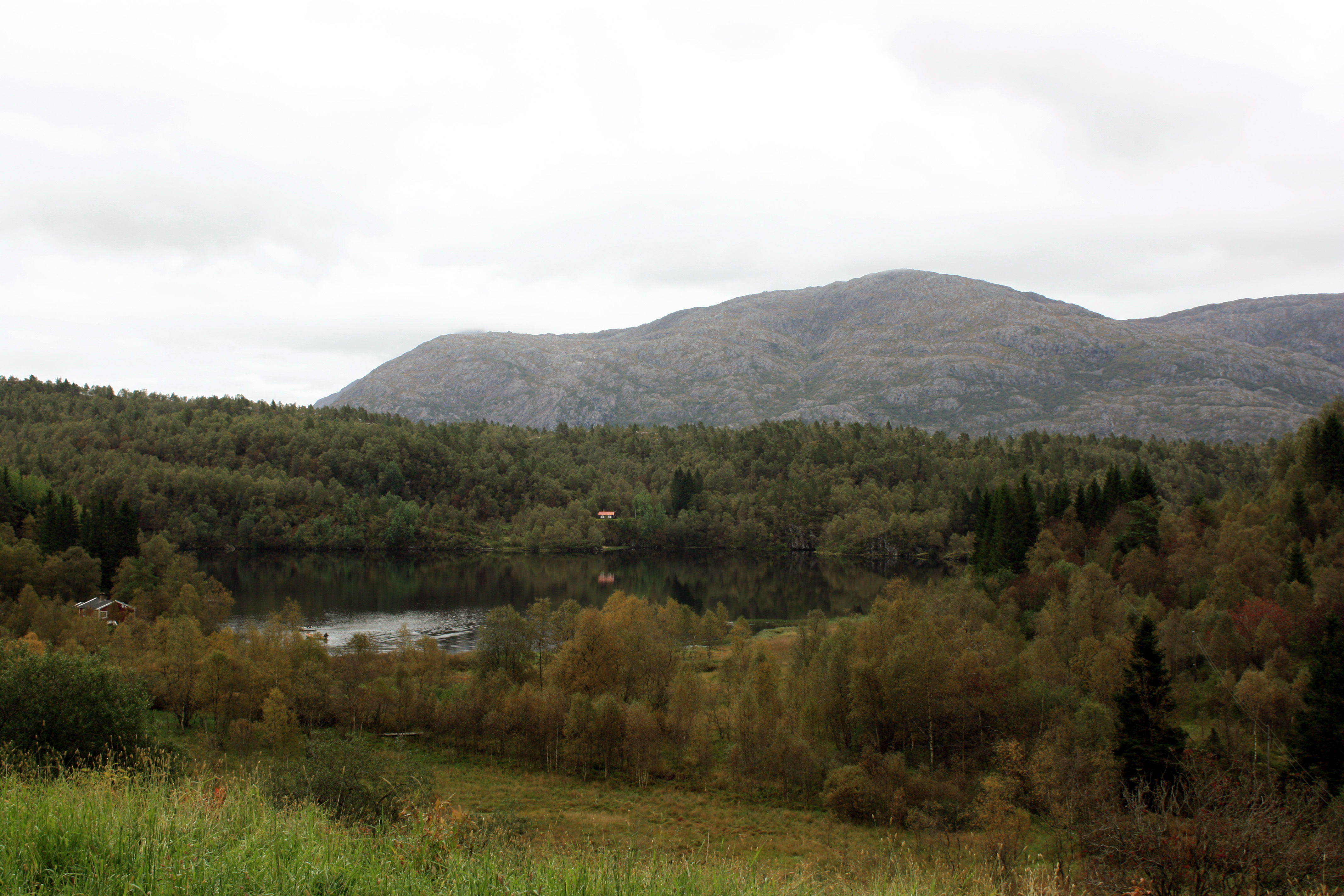 Frotveitvatnet, Frotveit, Fana, Bergen.